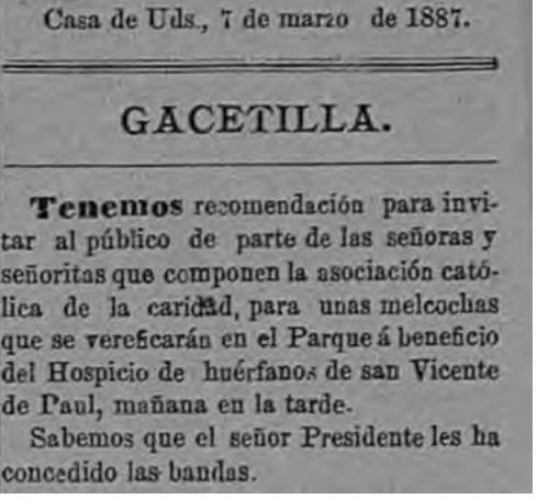 Detalle del periódico Boccacio, original parte de la colección de la Biblioteca Nacional de Costa Rica, SINABI